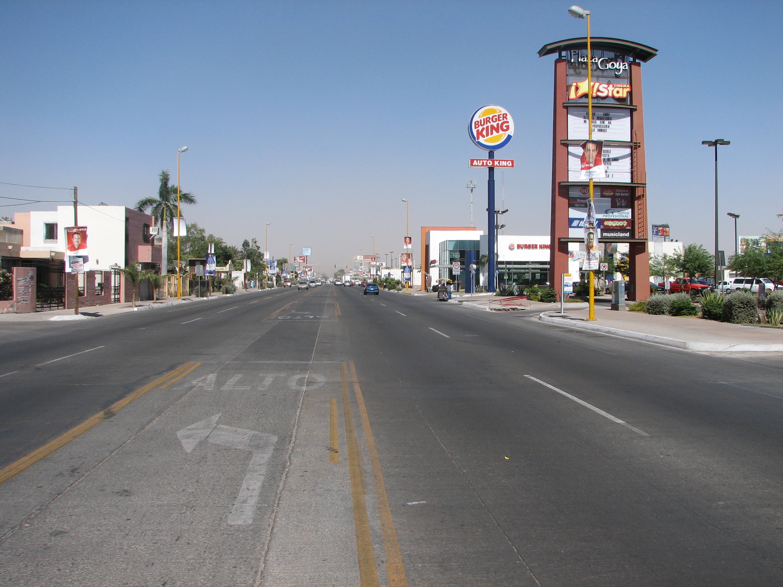 Avenida de Cd. Obregon Sonora